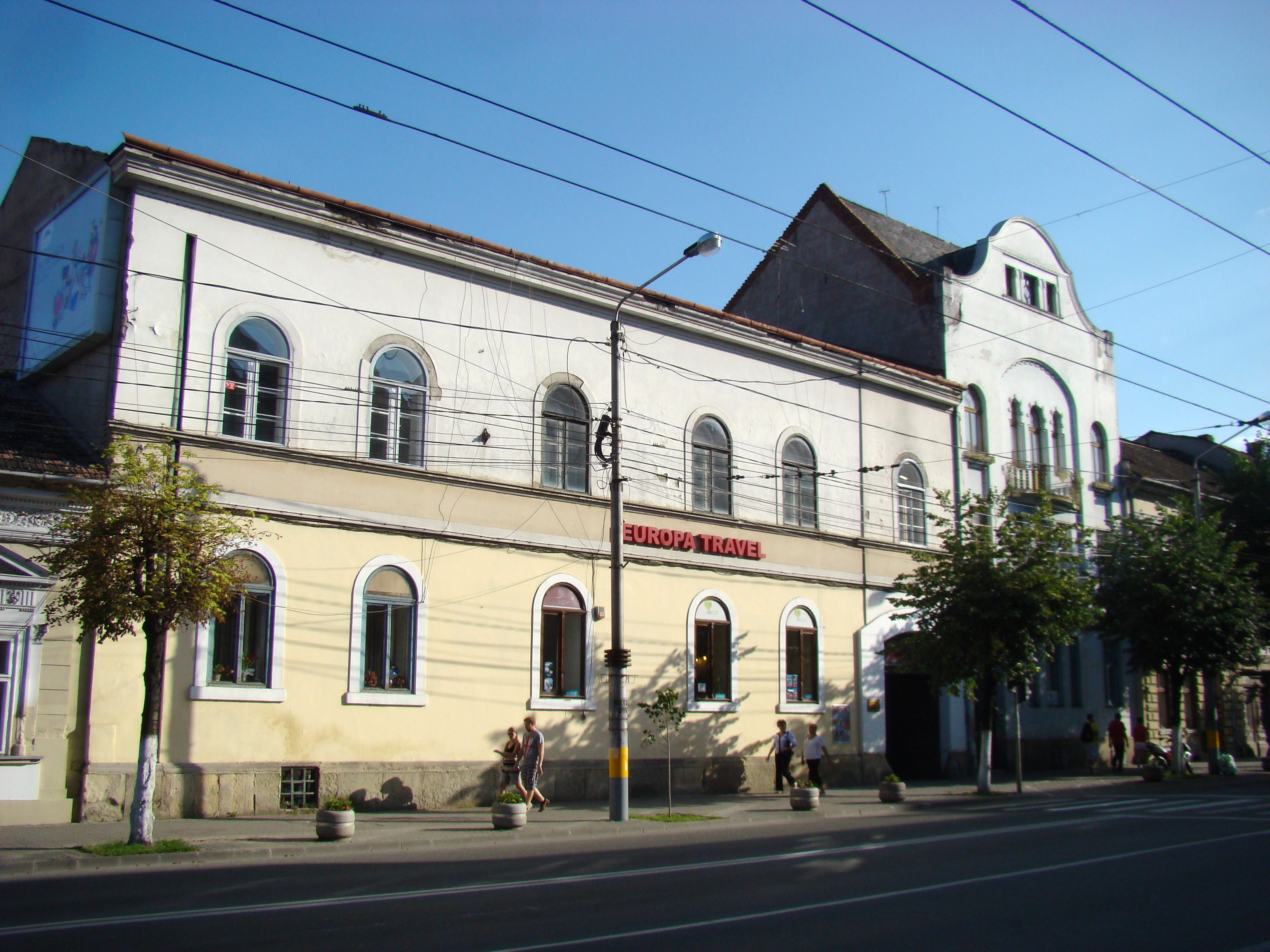 Casă, monument istoric, Bd.21 Decembrie 1989, nr.36